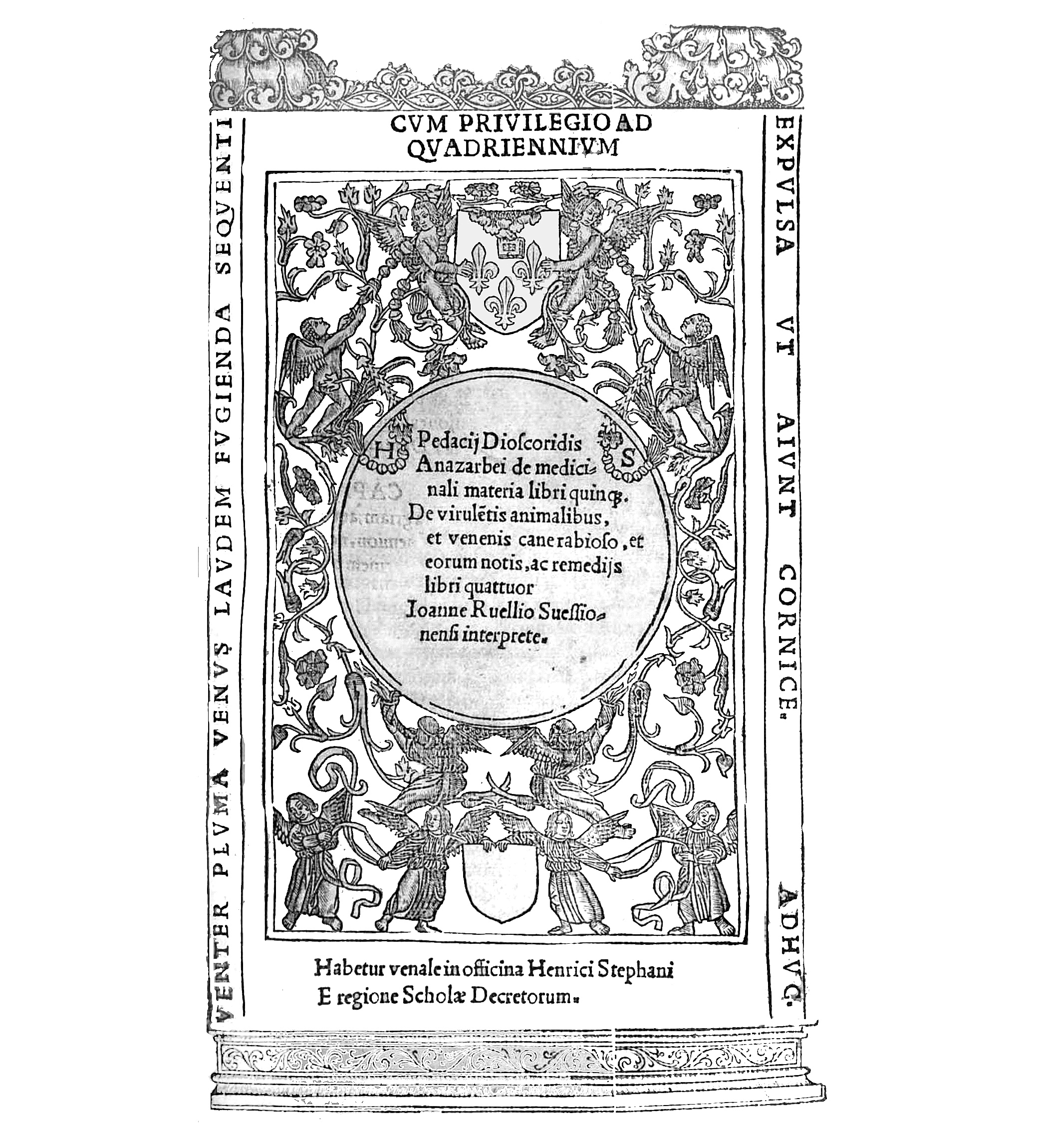 Titelblatt